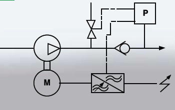 schemat obrazujący metodę regulacji sprężarki wyporowej za pomocą zmiany prędkośc obrotowej